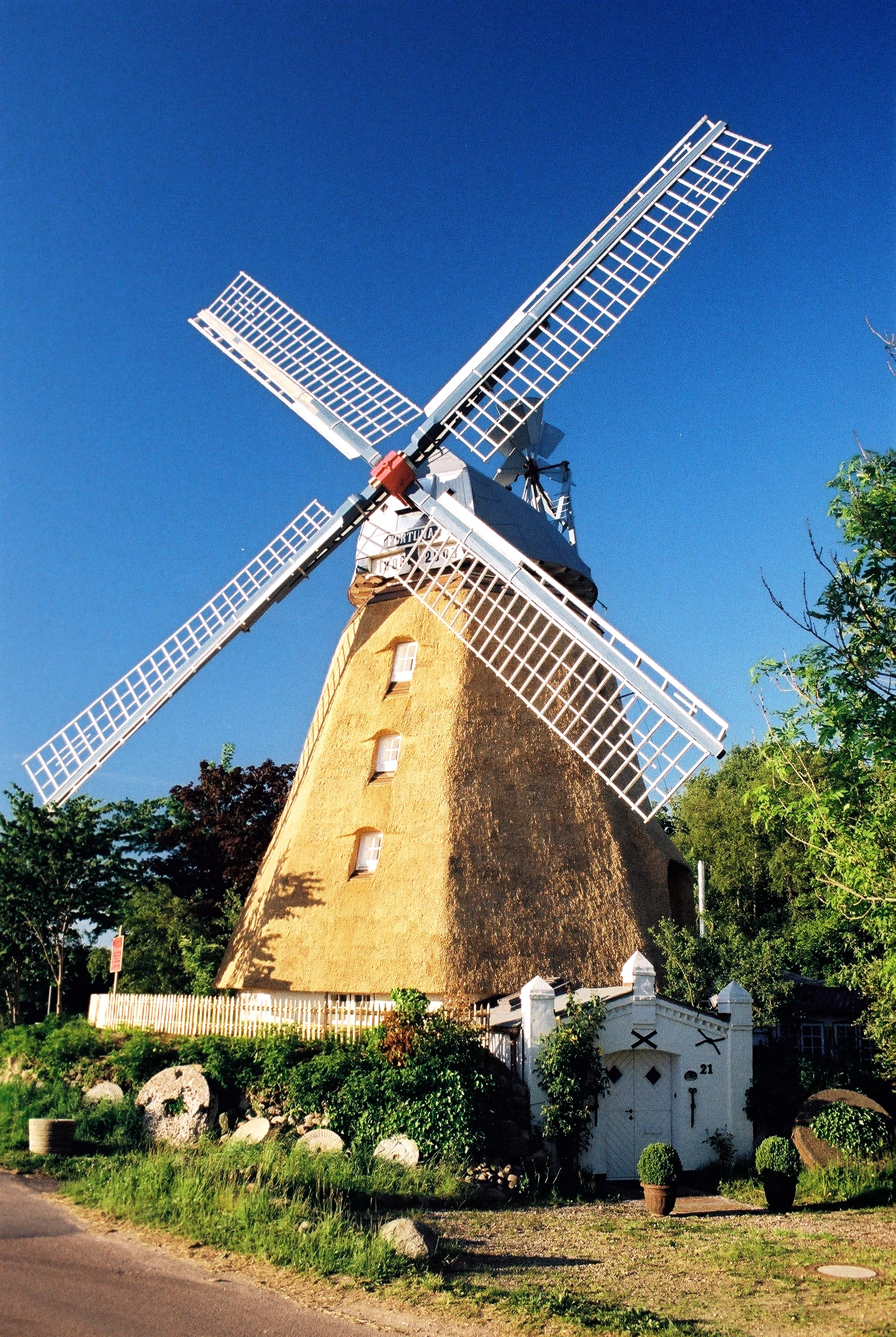 Das Wahrzeichen von Struckum, die historischen Graupenmühle Fortuna